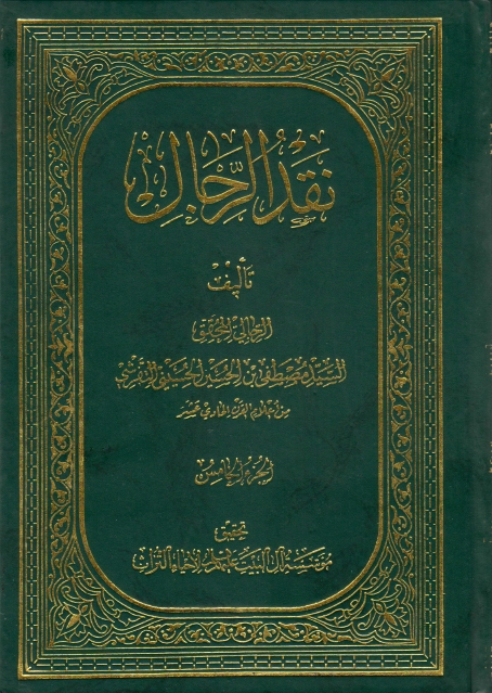 كتاب نقد الرجال